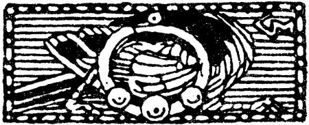 Gerhard Munthe: Illustration for Eiriksønnenes saga. Snorre 1899-edition. vignett 5